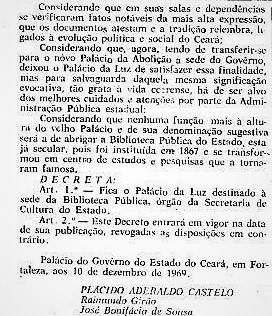 Decreto estadual de 10 de dezembro de 1969 que instala a Biblioteca Pública do Estado do Ceará no Palácio da Luz.